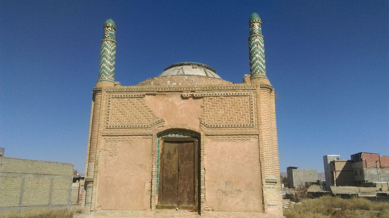 آرامگاه کشته‌شدگان واقعه لهاک‌خان